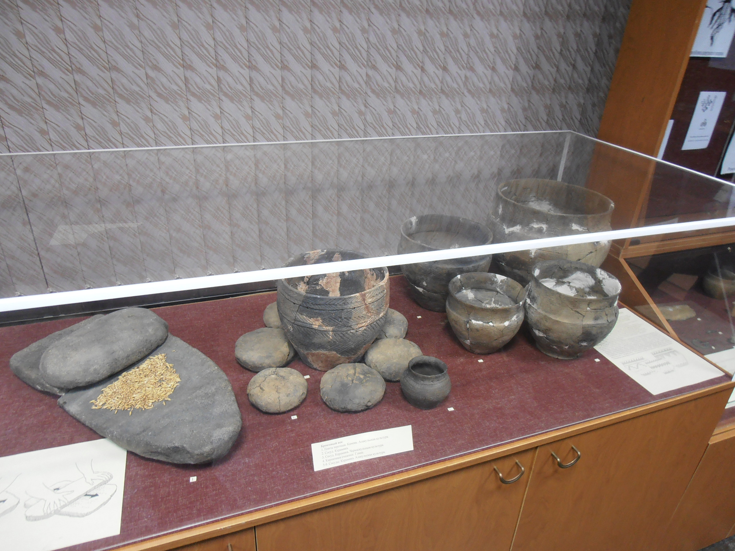 Артефакты бронзового века. Ингальская долина. Экспонаты зала археологии Музея археологии и этнографии Тюменского государственного университета.